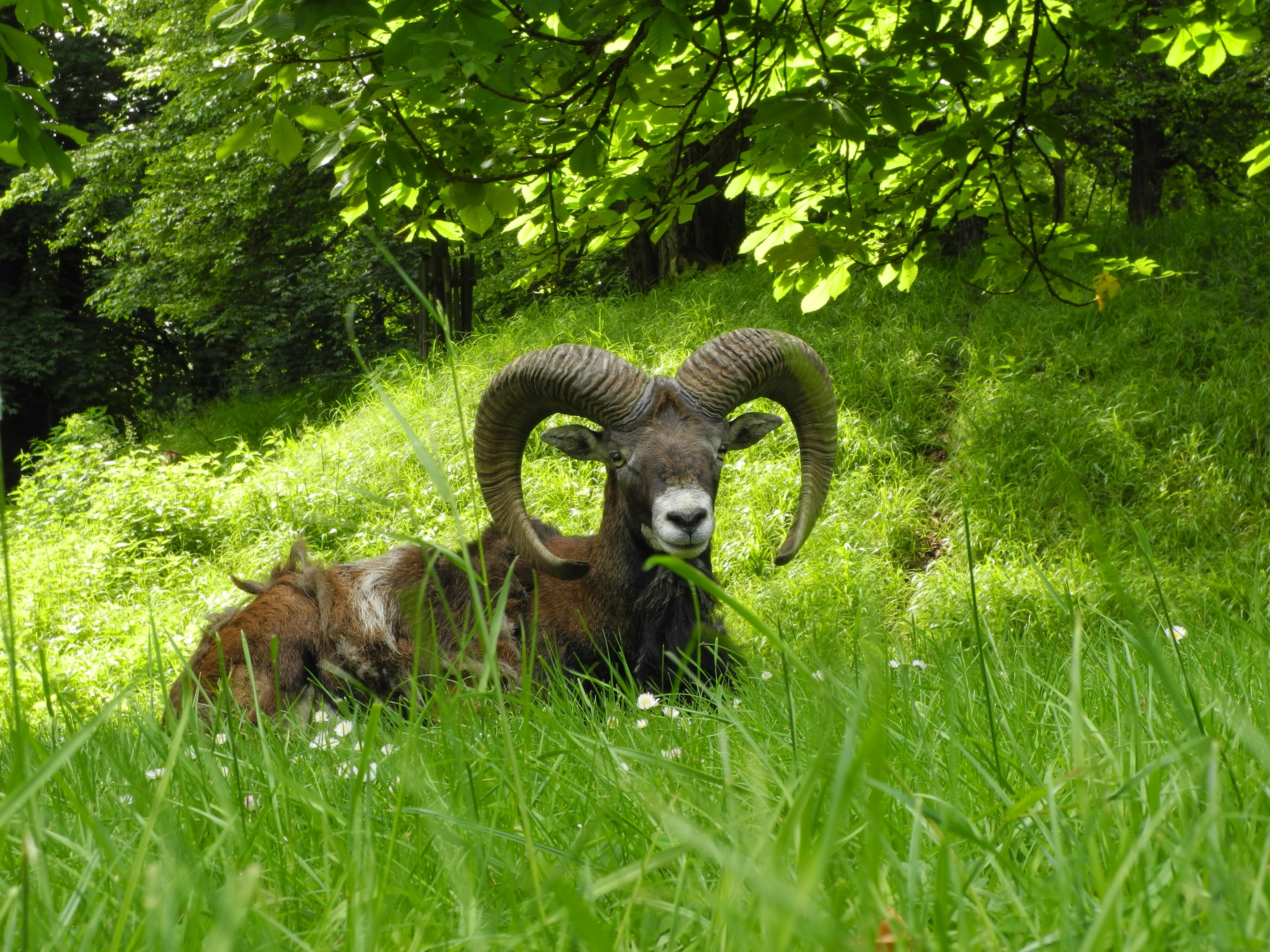 Ludwigsburg - Mufflon im Park Favorite